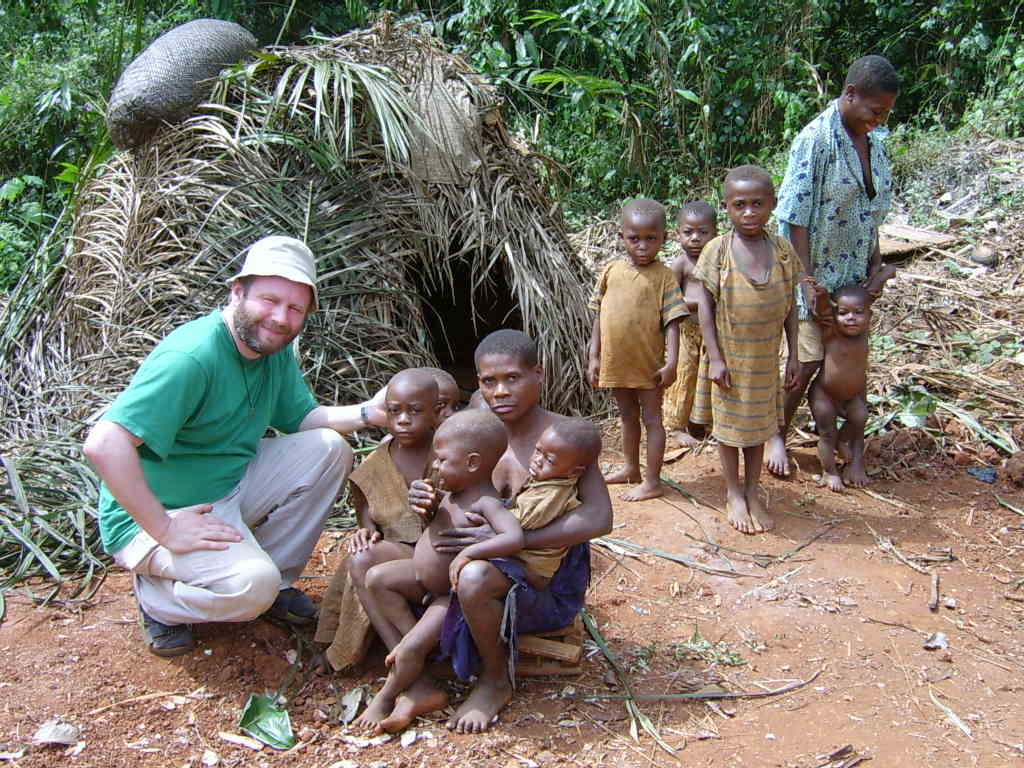 Grupa Pigmejow Baka. Zdjecie przedstawia autora przed szalasem z rodzina Pigmejow Baka w kamerunie Wsch.